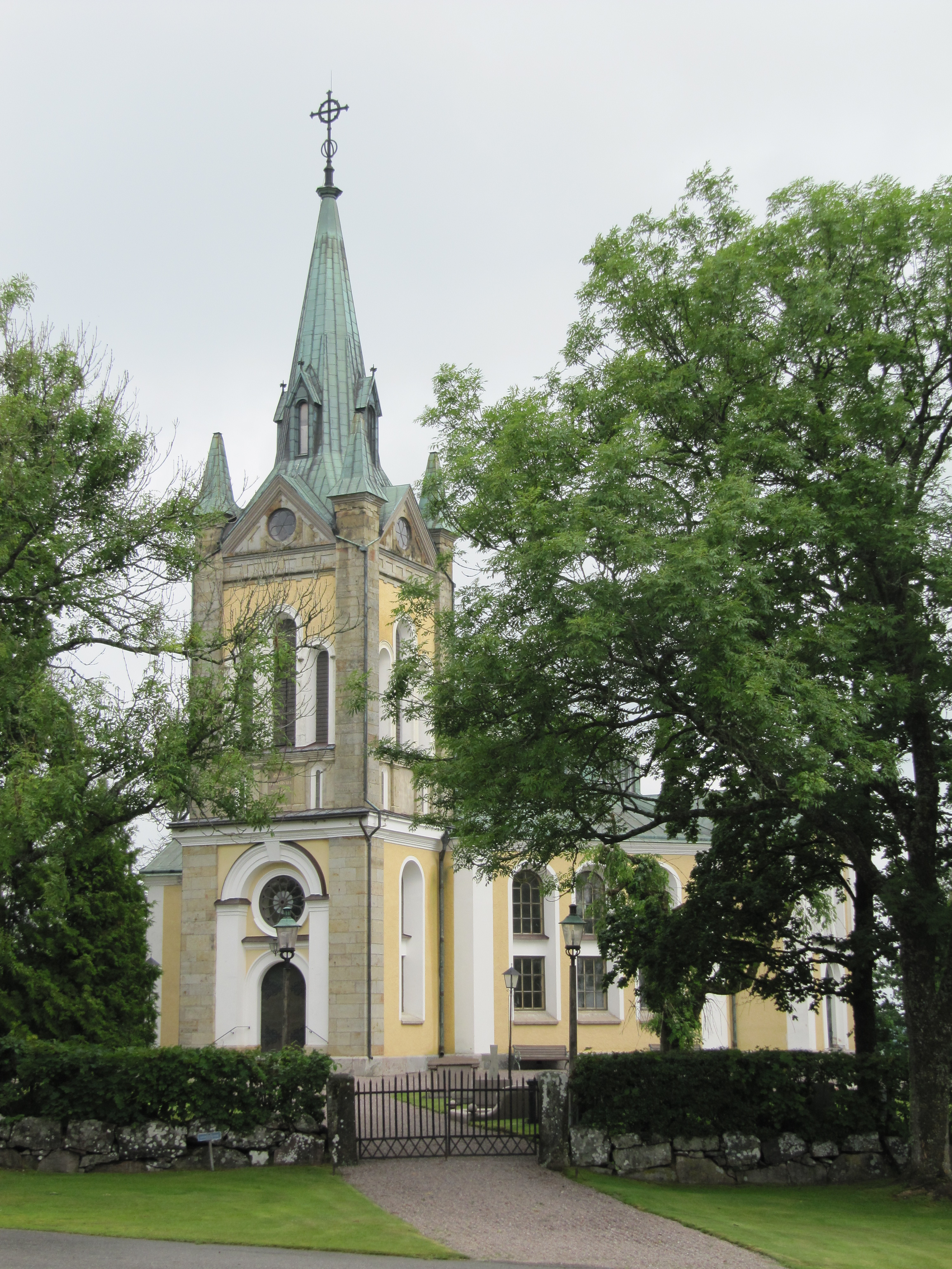 Mellby kyrka